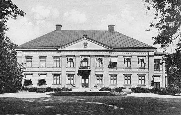 Hedensö herrgård på ett äldre vykort